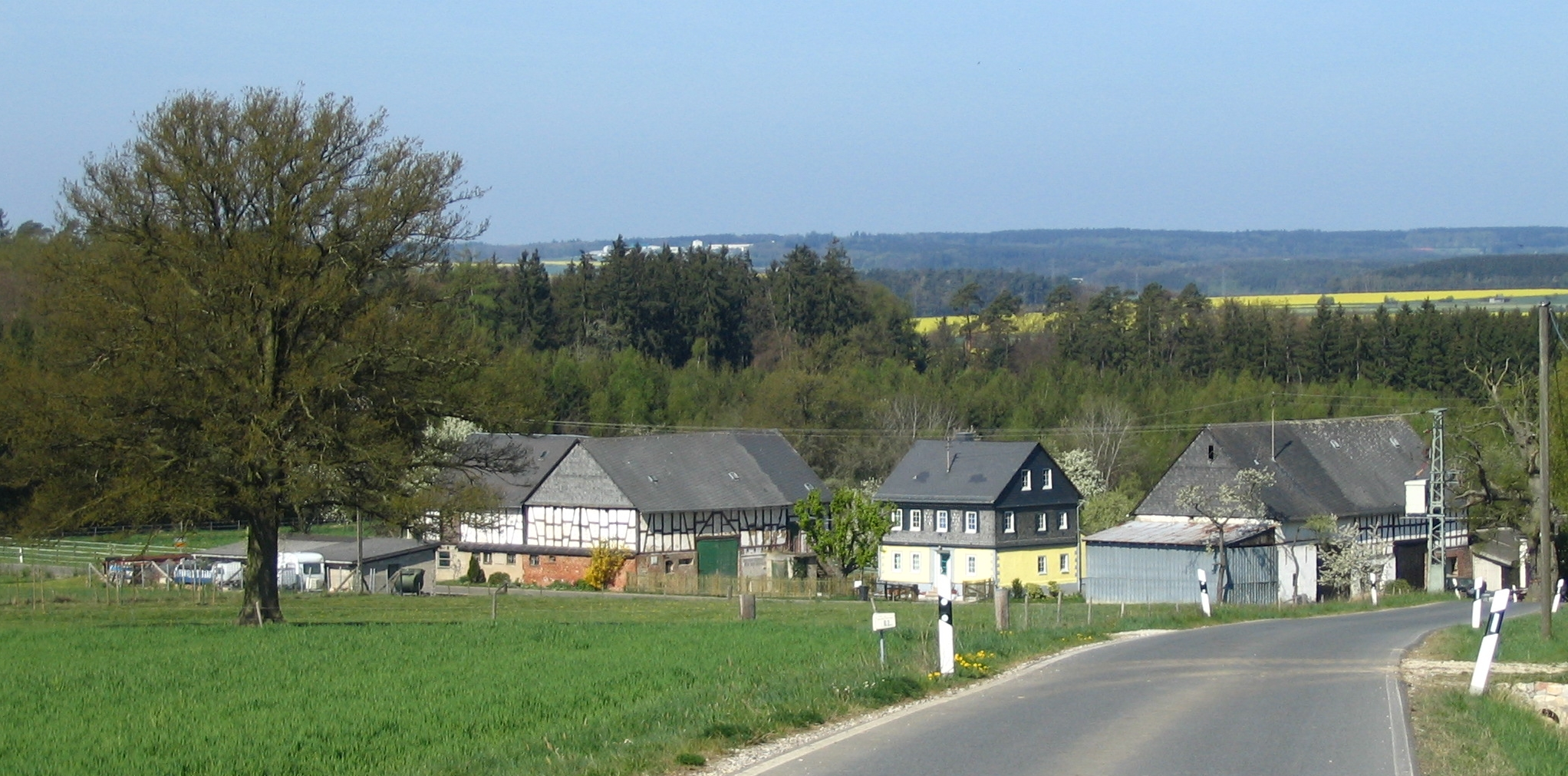 Wimmersbacherhof zwischen Belgweiler und Sargenroth